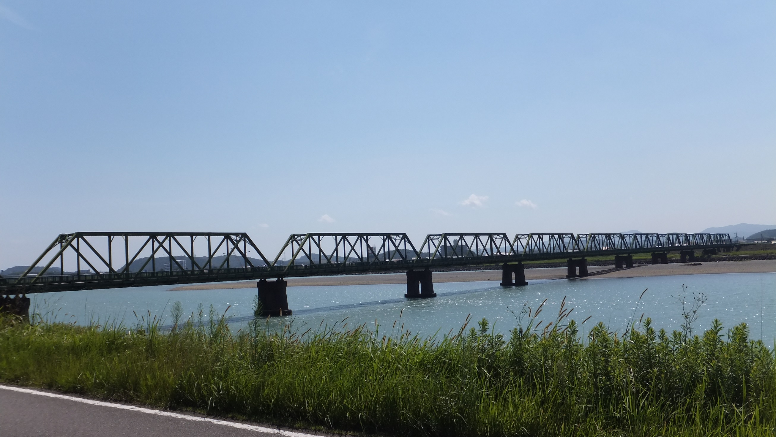 JR四国牟岐線那賀川橋梁 徳島県阿南市 （那賀川左岸より撮影）